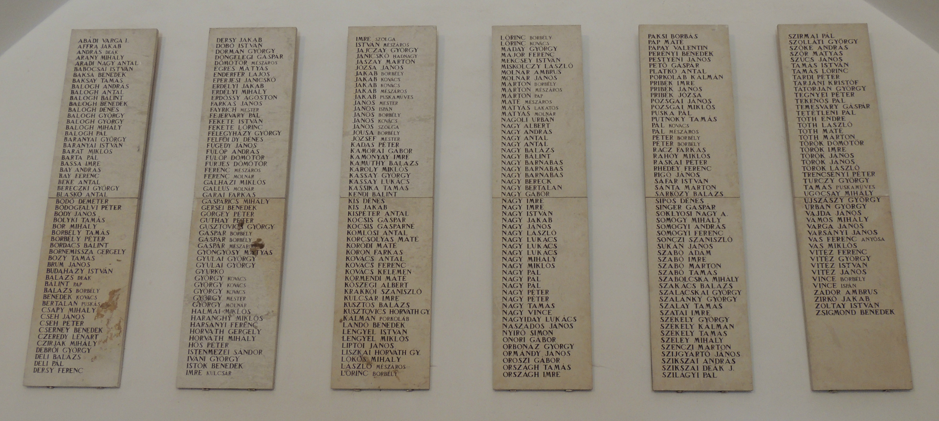 Az egri vár ismert várvédő hőseinek névsora a Hősök termében.